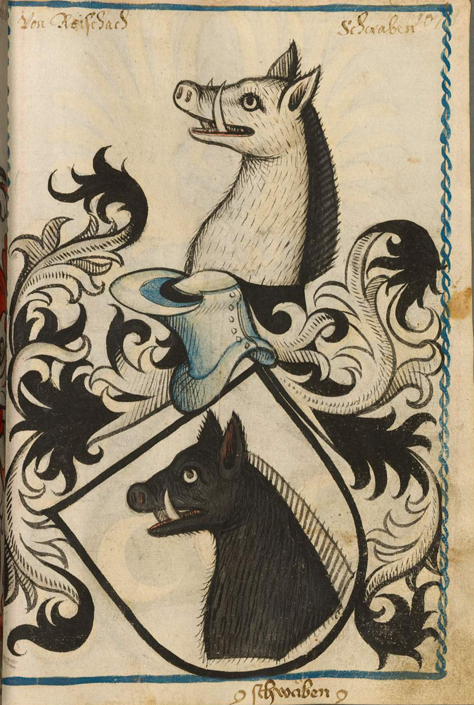 Scheibler'sches Wappenbuch, älterer Teil Reischach